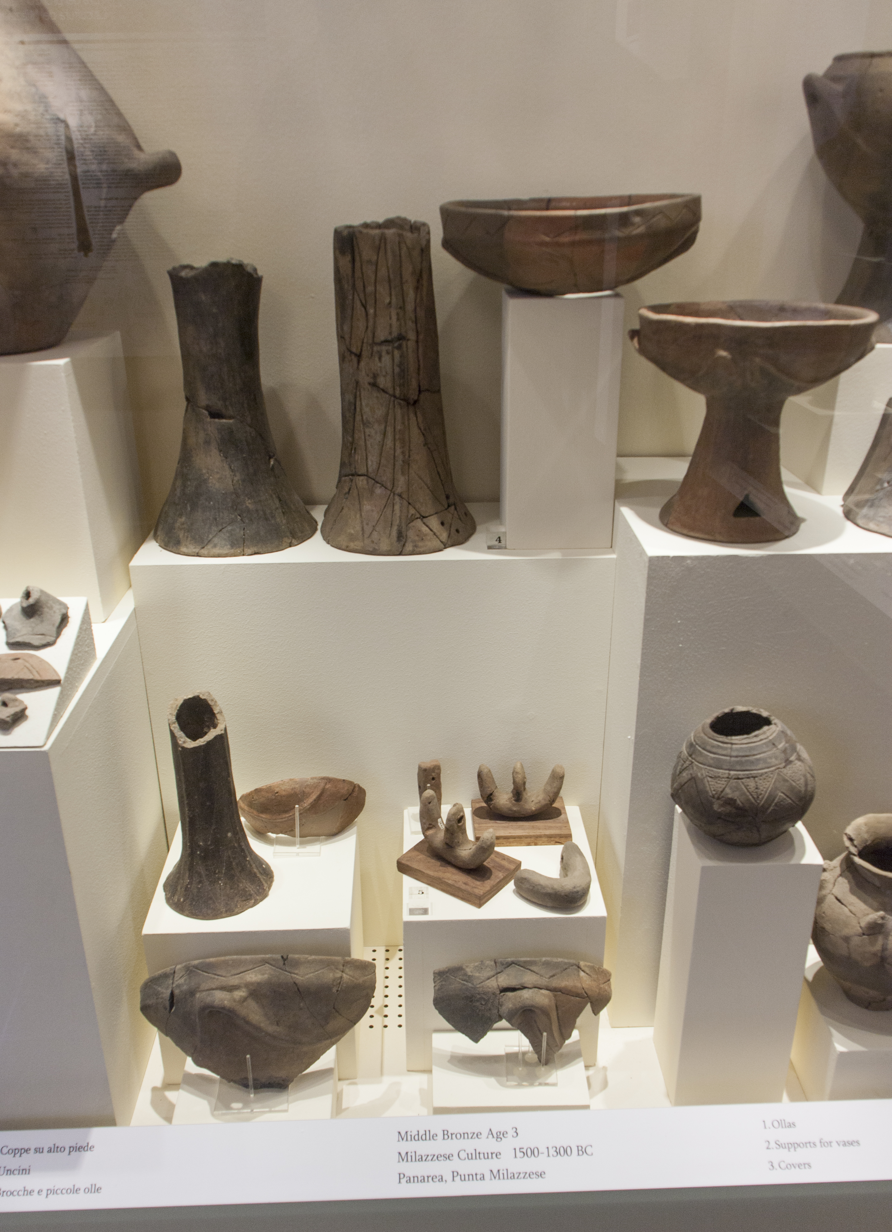 Età del bronzo medio 3 Cultura di Milazzese 1500-1300 a.C. Panarea, Punta Milazzese